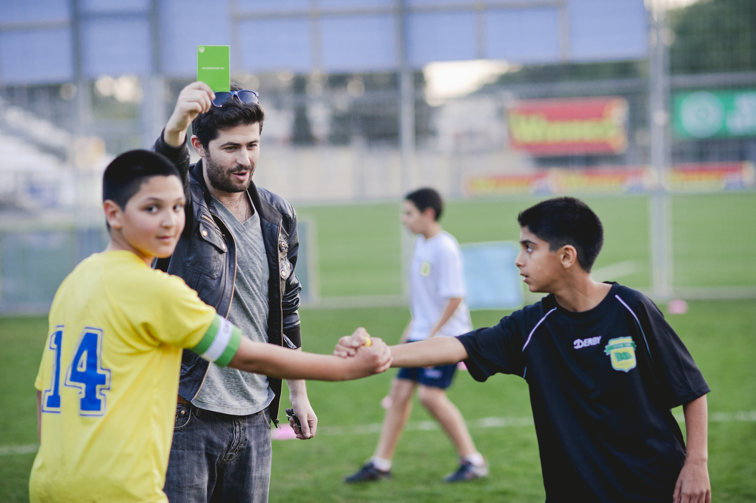 שופט מתנדב שולף כרטיס ירוק, בו נעשה שימוש בפרויקט "שער שוויון" כדי לתגמל על התנהגות ספורטיבית והוגנת של התלמידים